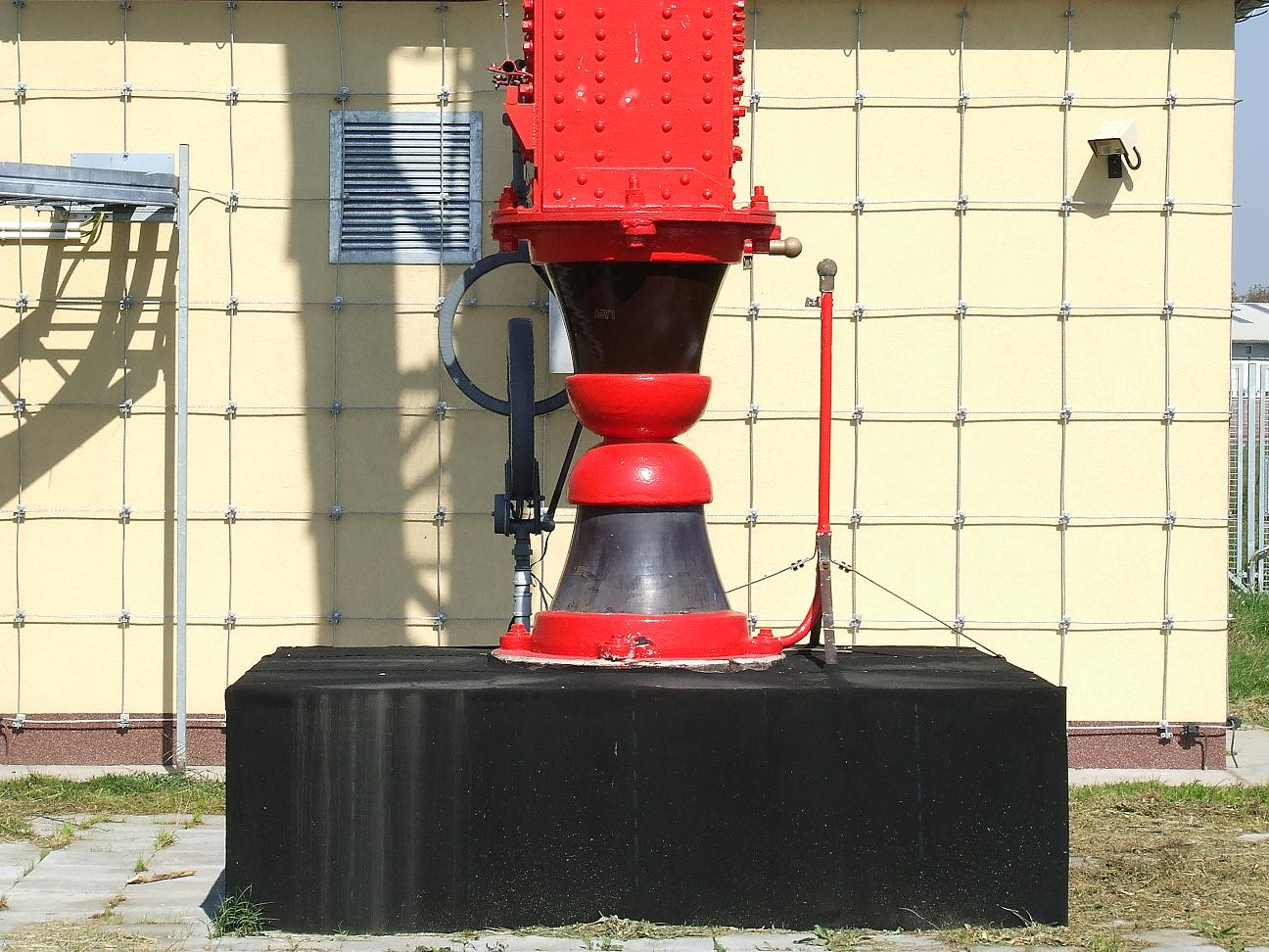 A lakihegyi adótorony talpcsuklója 2007. szeptember 22-én.